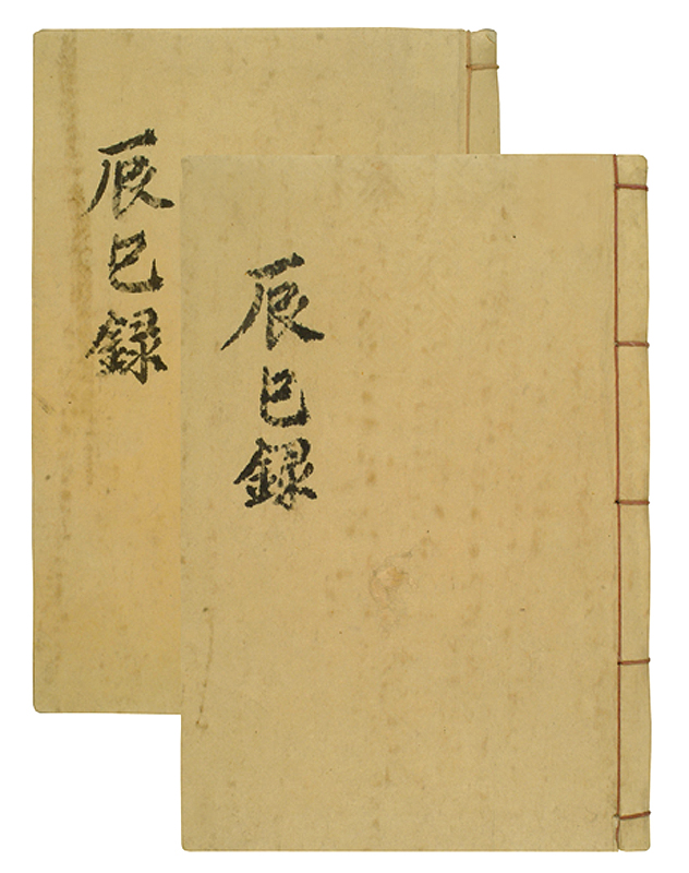 보물 제160호 유성룡 종가 문적(柳成龍 宗家 文籍) 중 유성룡 종가 문적 - 진사록(柳成龍 宗家 文籍 - 辰巳錄)